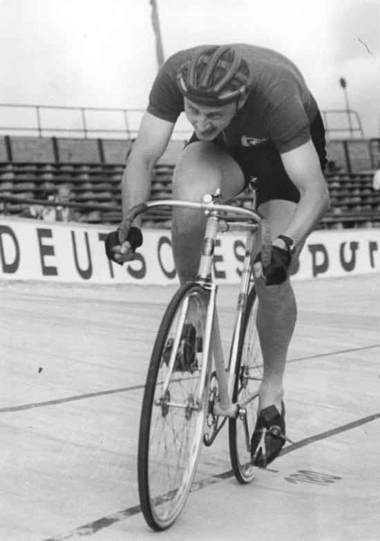 Rolf Nitzsche Zentralbild Funck 26.7.1956 DDR-Meisterschaften im Bahnfahren In der Zeit vom 22.7.1956 28.7.1956 finden in Berlin-Weissensee die Titelkämpfe der Bahnfahrer der DDR statt. In der Meisterschaft im 1000 m Zeitfahren der Junioren siegte der Karl-Marx-Städter Helmut Lehmann in der Zeit von 1:13,4 Min. UBz:Der Meister des Sports Rolf Nitzsche (SC Dynamo Berlin) plazierte sich auf dem Ehrenplatz.